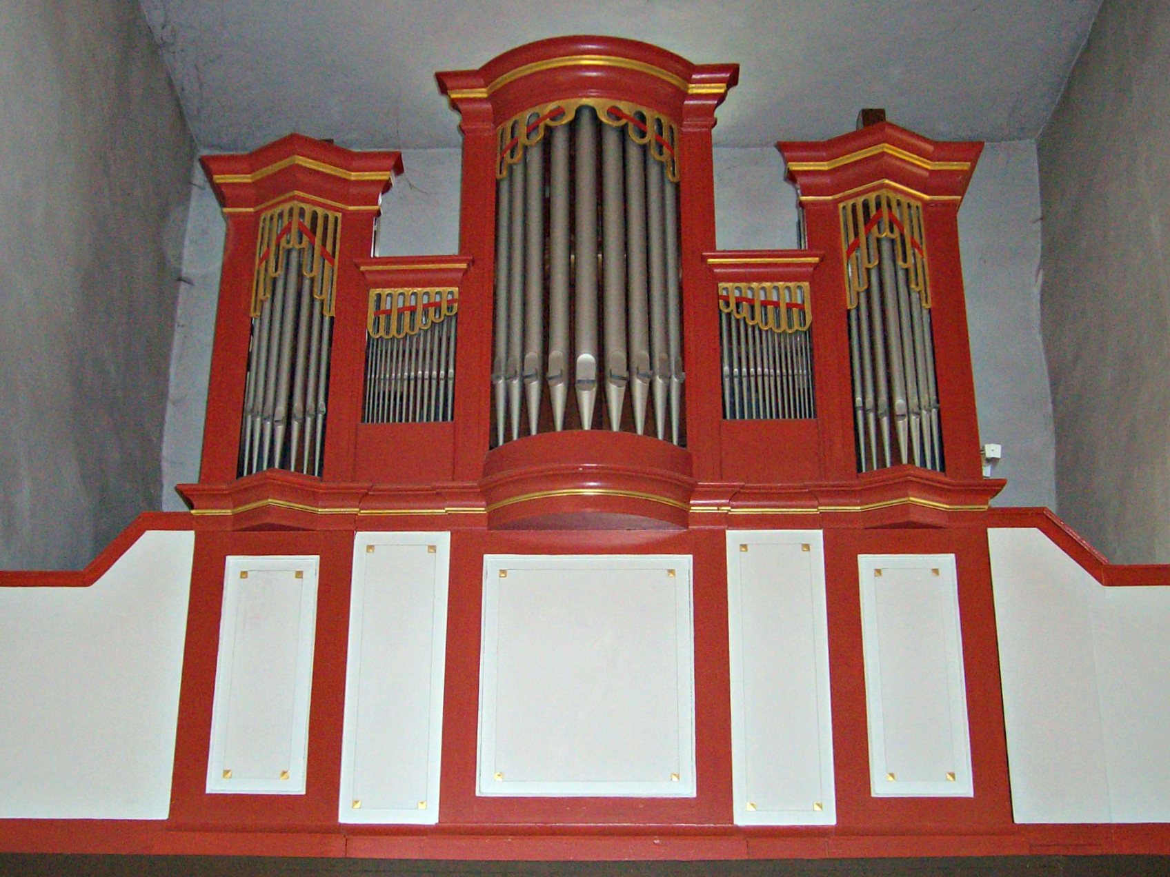 Evangelische Kirche Queckborn, Grünberg, Landkreis Gießen, Hessen, Deutschland